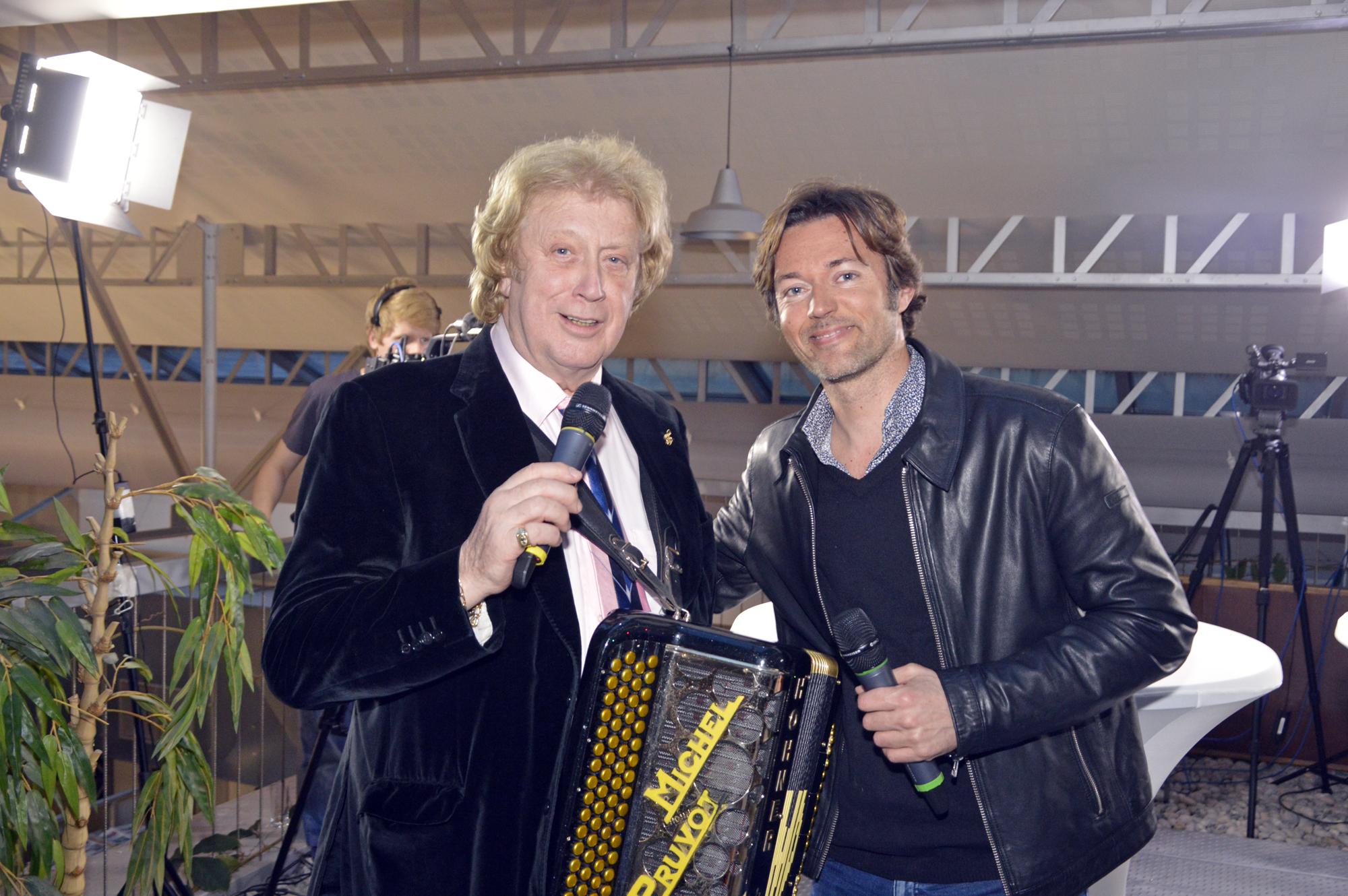 Michel Pruvot (accordéoniste) et Alex (Dessinateur de presse)